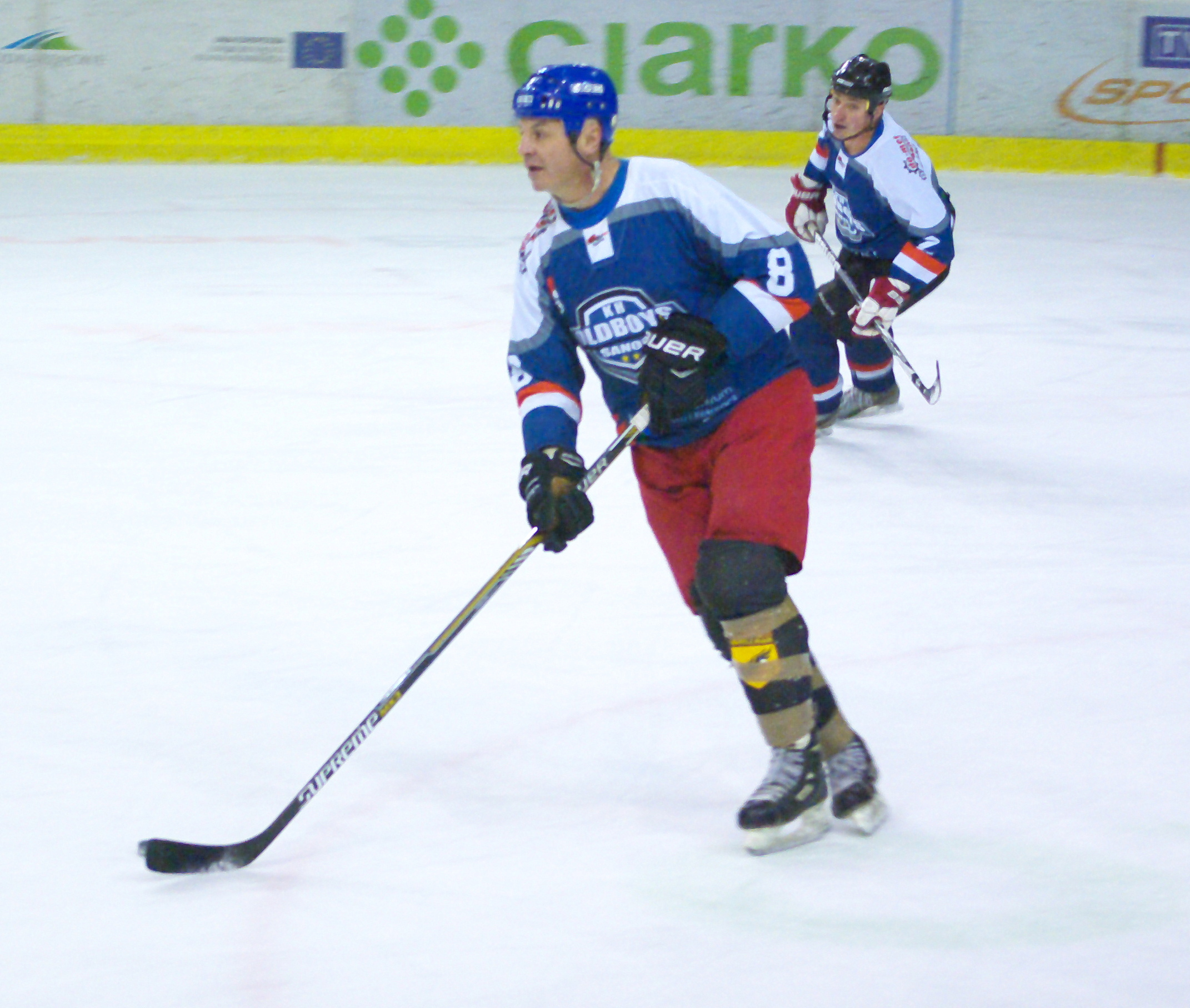 Marcin Ćwikła w barwach KH Oldboys Sanok w meczu przeciw GKS Tychy (2016, Arena Sanok).